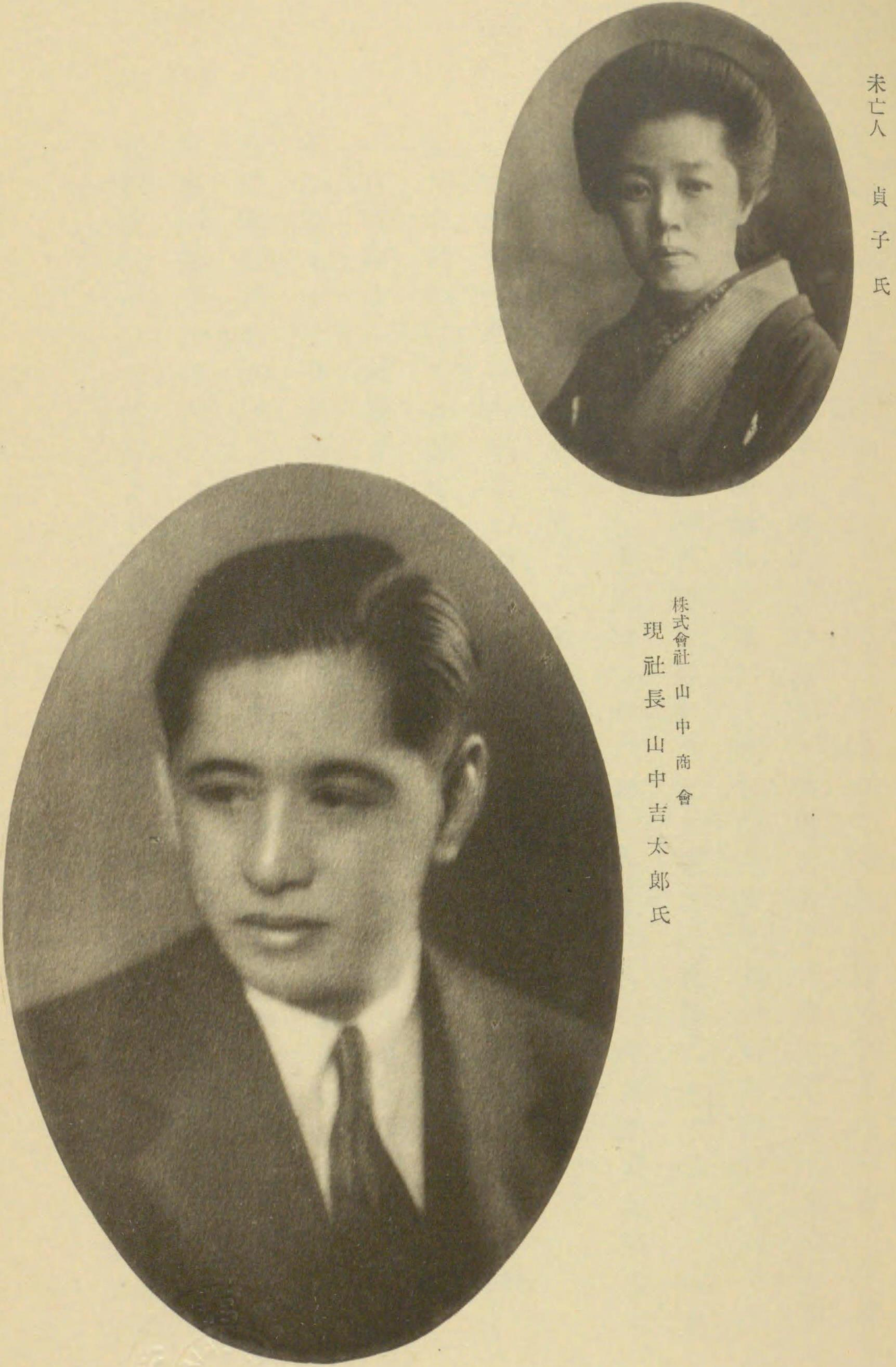 株式会社山中商会 現社長 山中吉太郎 未亡人 貞子